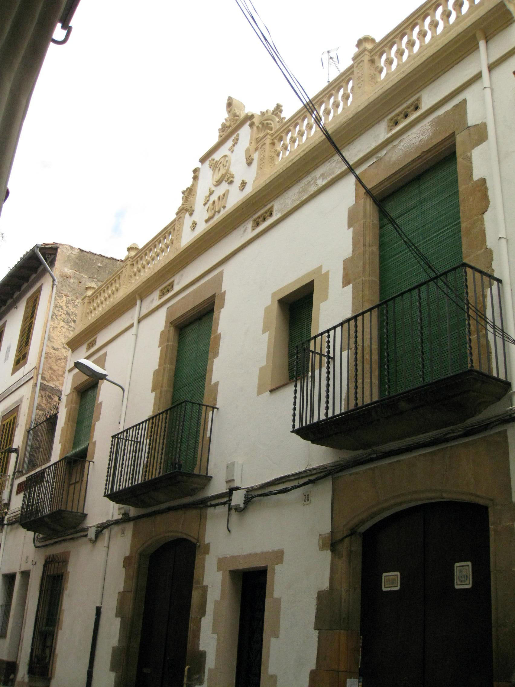 Casa al carrer d'Avall, 38-40 (Arenys de Mar)